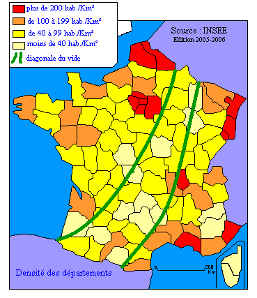 Mise à jour de la carte de densité des départements français avec les données de 2005-2006, à partir d'une carte crée par l'utilisateur Urban.